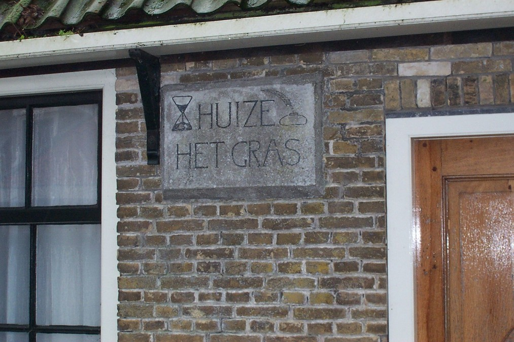 Huize Het Gras, uit de werken van Gerard Reve, ligt in het Friese dorp Greonterp. Eigen werk.